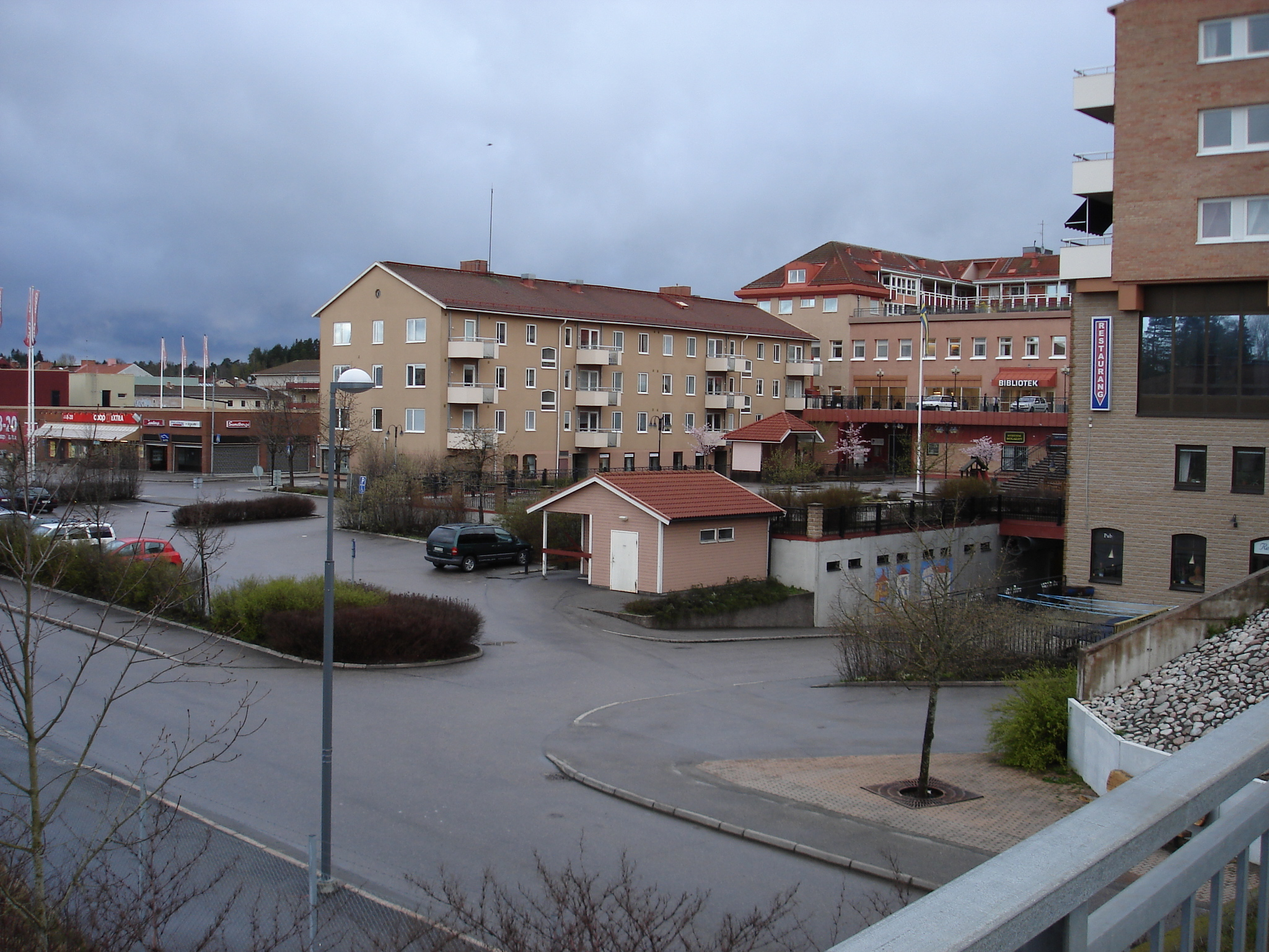 Flen, Violtorget 2007